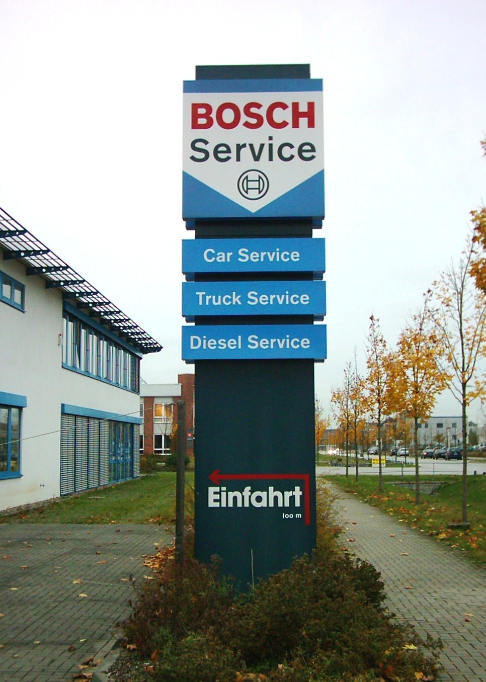 Bosch-Service in Hamburg-Rahlstedt, Gewerbegebiet Höltigbaum.